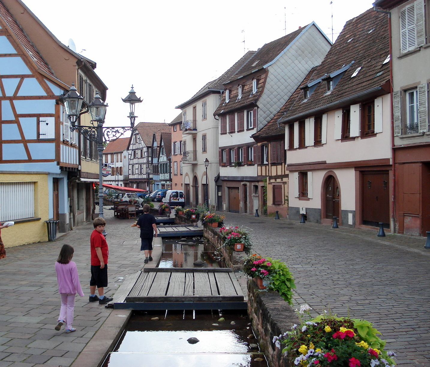 Barr, comm. du dép. du Bas-Rhin, France (région Alsace). Rue typique dans le centre ville.